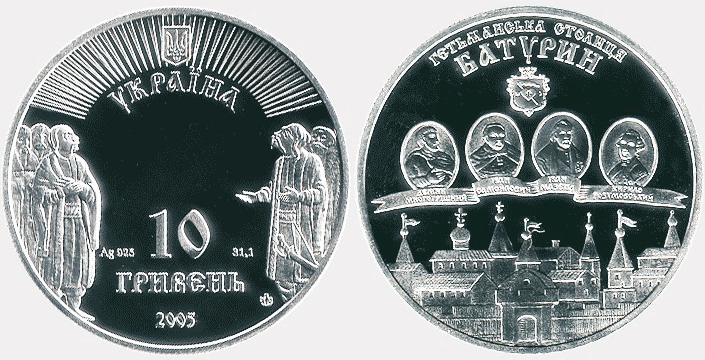 Монета України, присвячена м. Батурин (10 гривень 2005 року). Срібна монета 10 гривень 2005 року ("Батурин") із серії "Гетьманські столиці"